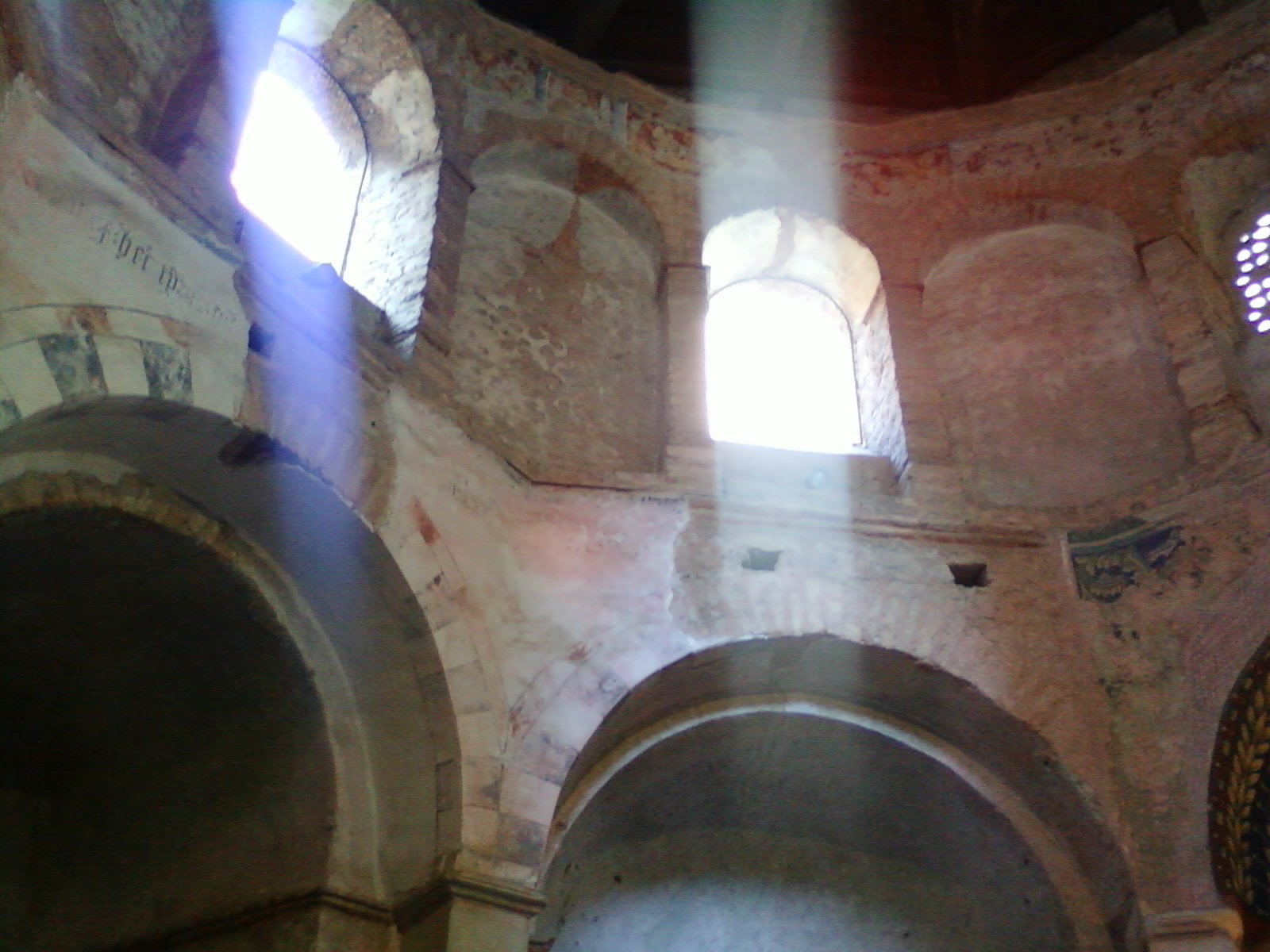 Interno della cupola del battistero di Albenga con tracce di Affreschi quattrocenteschi (Italy)